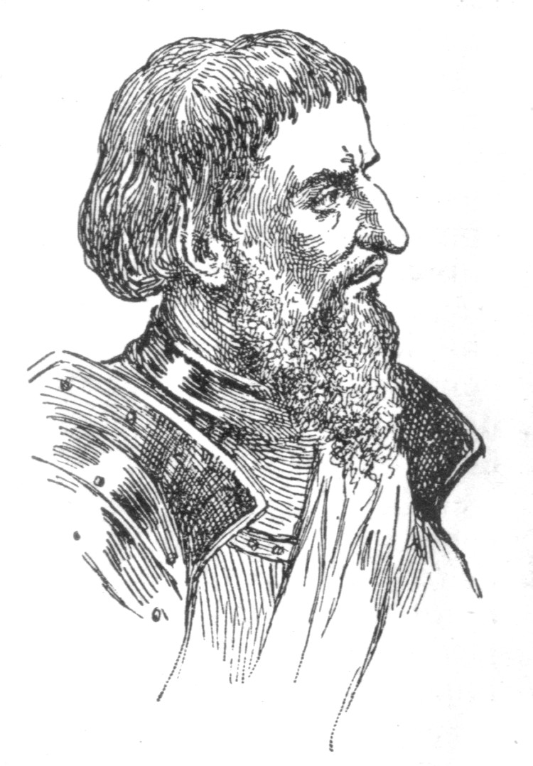 Jean II Le Meingre, surnommé Boucicaut